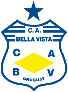 Escudo del Club Atlético Bella Vista